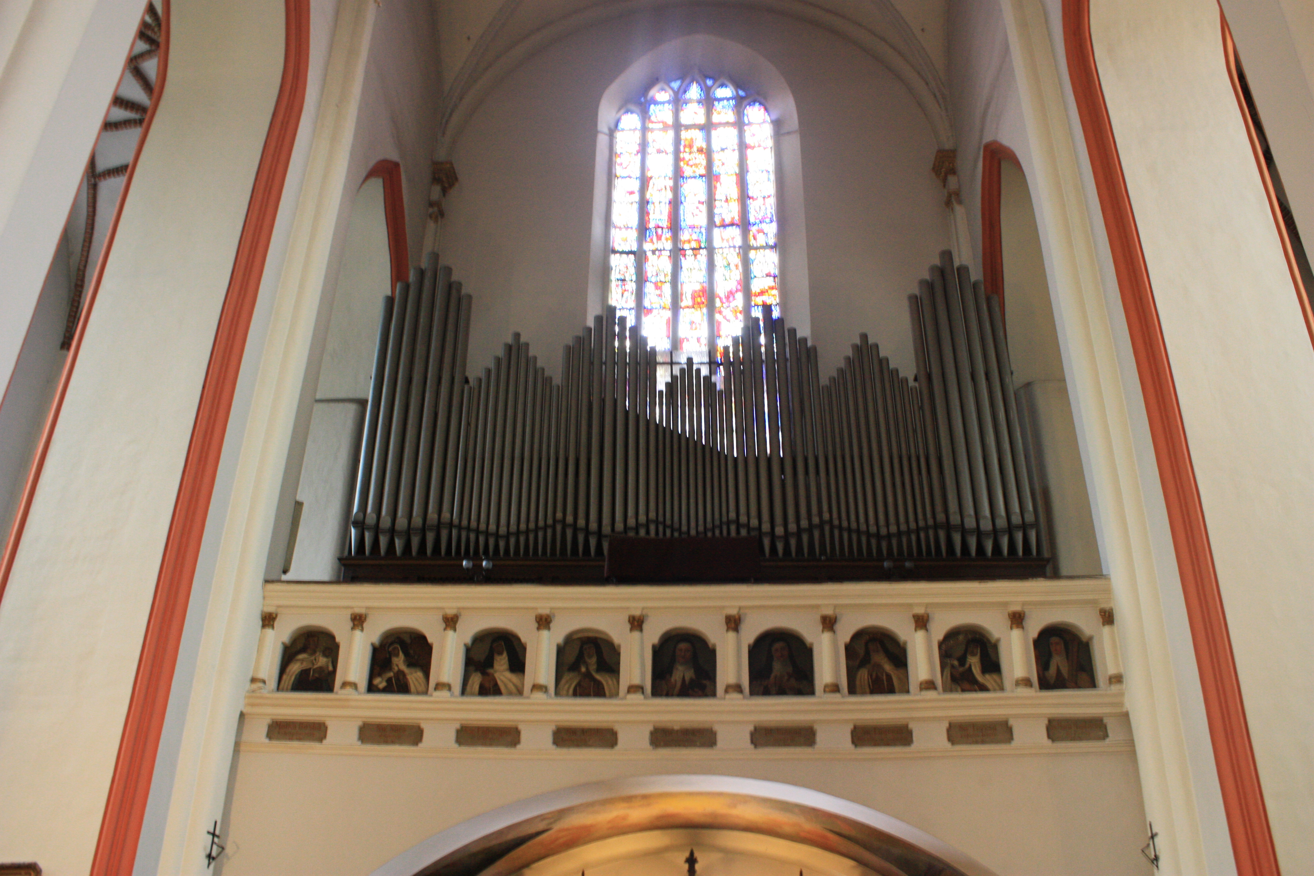 Kościół Bożego Ciała w Poznaniu. Organy.